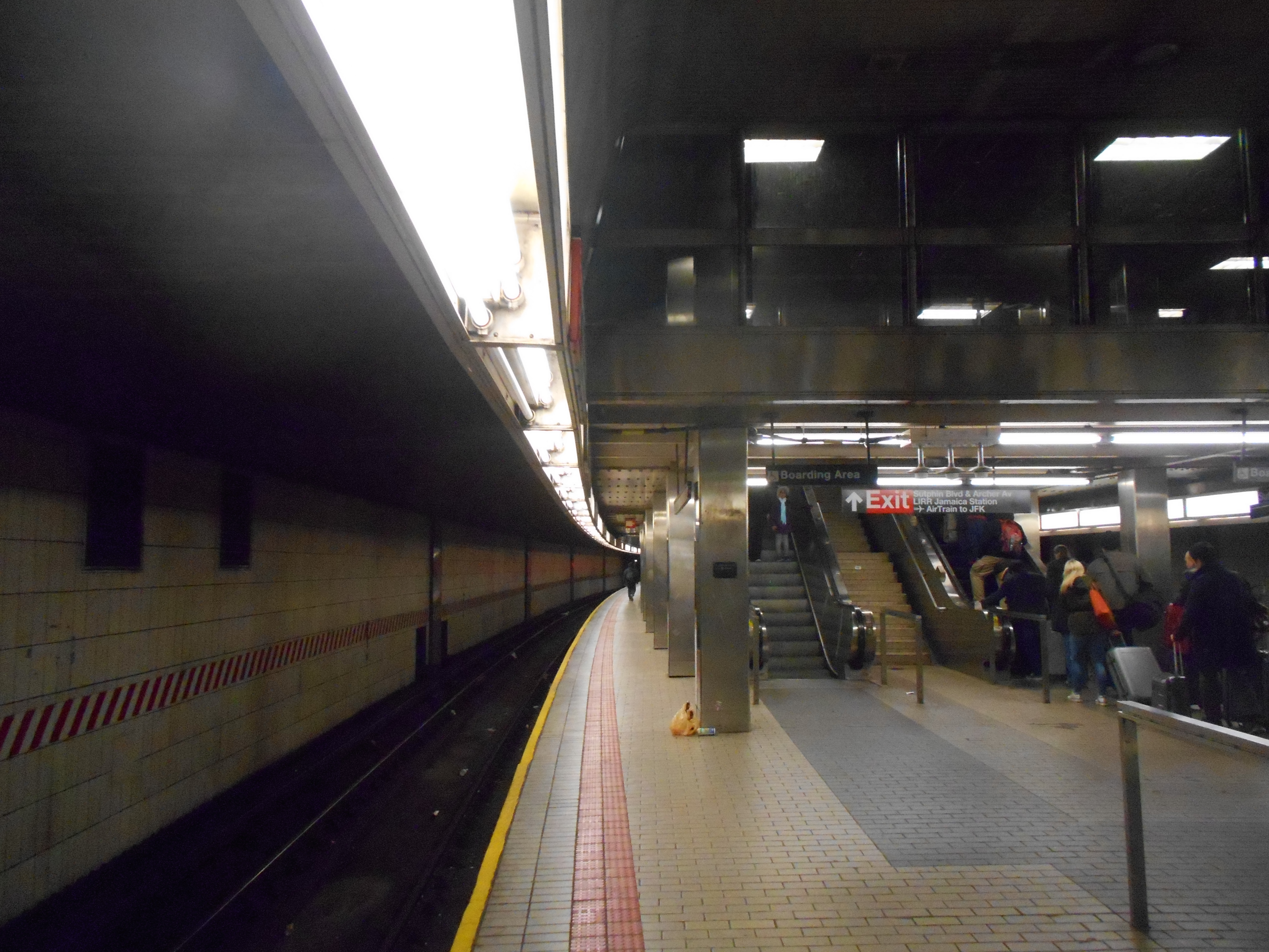 Jamaica, Queens